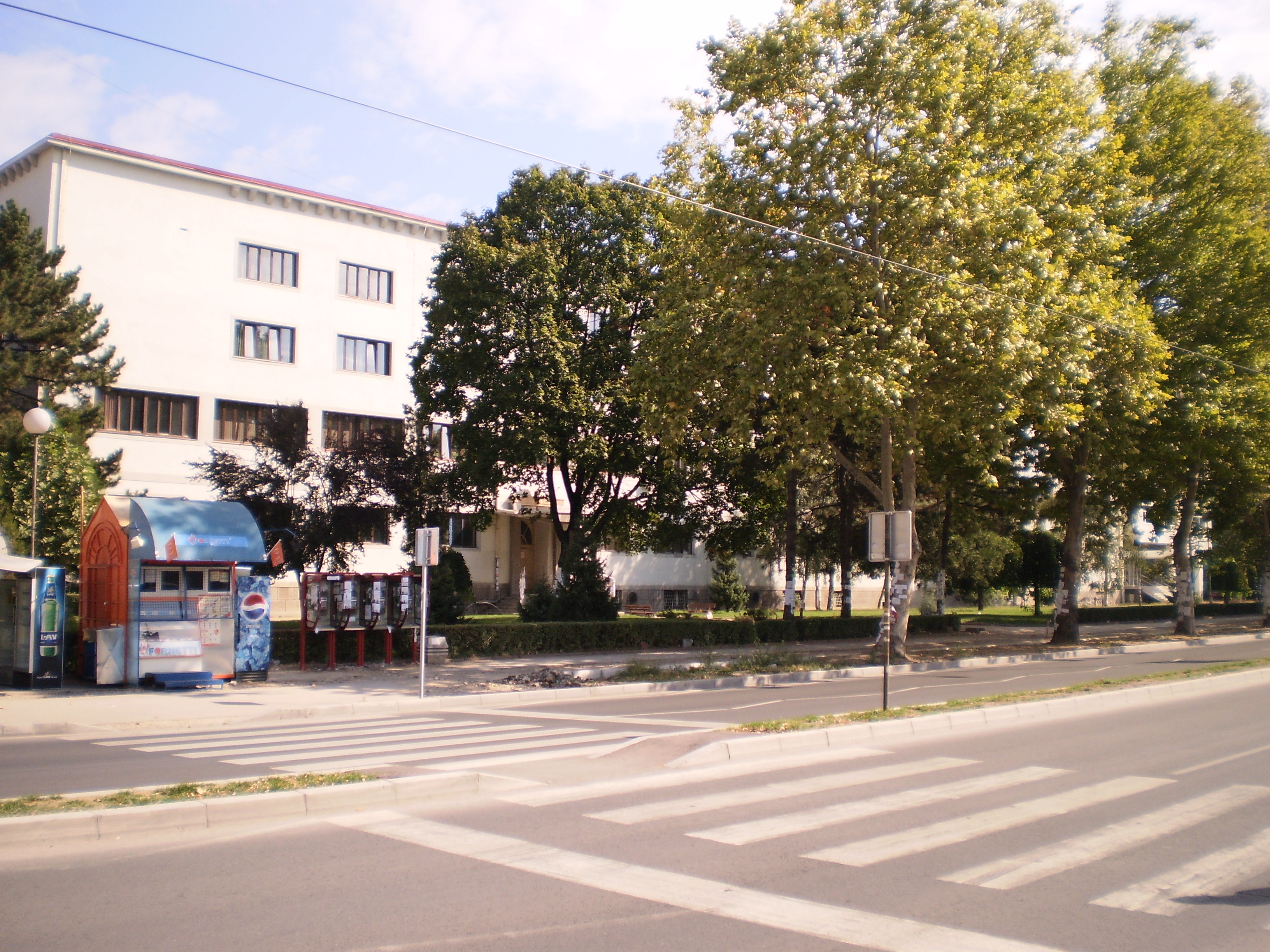 Medicinski fakultet u Nišu. Autor dr Milorad Dimić. 2. oktobar 2011.